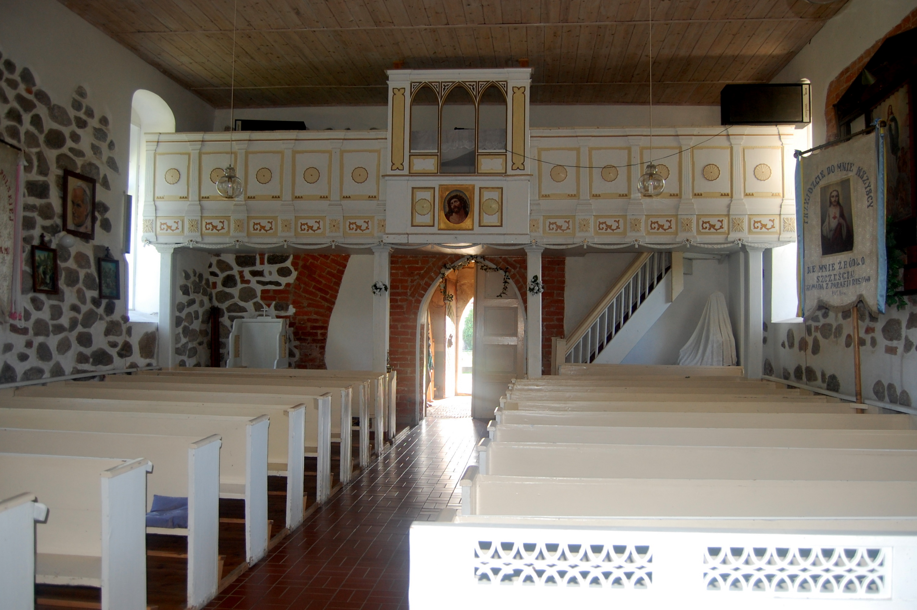 Kościół w Rusowie - widok od strony ołtarza